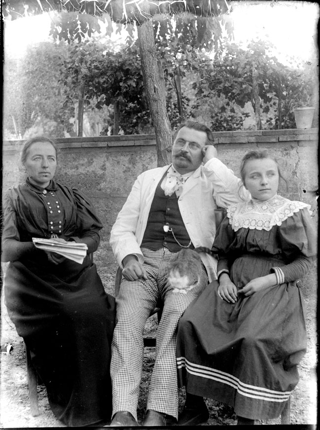 Fonds Trutat - Photographie ancienne Cote : PERB018_ Localisation : Fonds ancien (S 30) Original non communicable Titre : Portrait de famille : Antonin Perbosc, sa femme Maria et sa fille Hélène dans le jardin Auteur : Trutat, Eugène Rôle de l’auteur : Photographe Date de création : 1859-1910 [entre] Observations : Collection Antonin Perbosc. Mot(s)-clé(s) : -- Portrait -- Famille -- Assis -- Couple -- Homme -- Costume masculin -- Femme -- Costume féminin -- Jeune fille -- Robe -- Chat -- Jardin -- Mur -- Arbre -- 19e siècle, 2e moitié -- 20e siècle, 1e quart Médium : Photographies -- Noir et blanc -- Portraits de groupe Bibliothèque de Toulouse. Domaine public